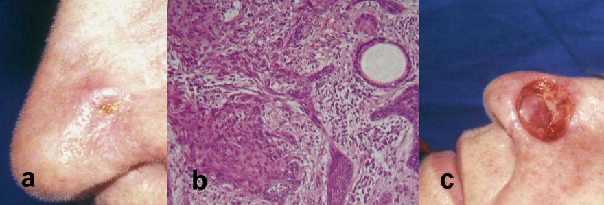 Exemplo de um tumor infiltrativo, no qual, o conceito de Margem de Segurança é falho.